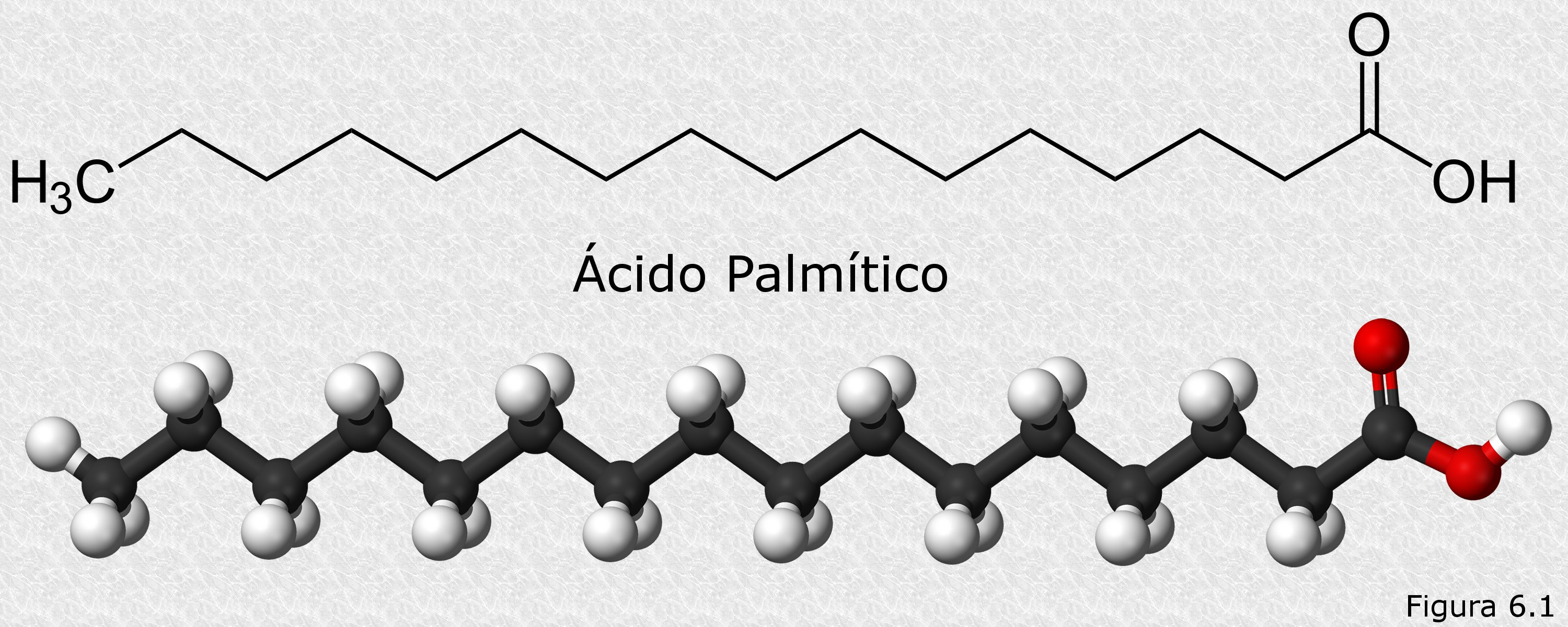 Ácido palmítico: fórmula estructural, modelo de bolas y varillas